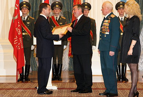 Грамота о присвоении городу Великий Новгород почётного звания «Город воинской славы» передаётся мэру города Юрию Бобрышеву. Справа – участник Великой Отечественной войны Алексадр Попов и тренер-преподаватель Центра физического развития Елена Кириллова.